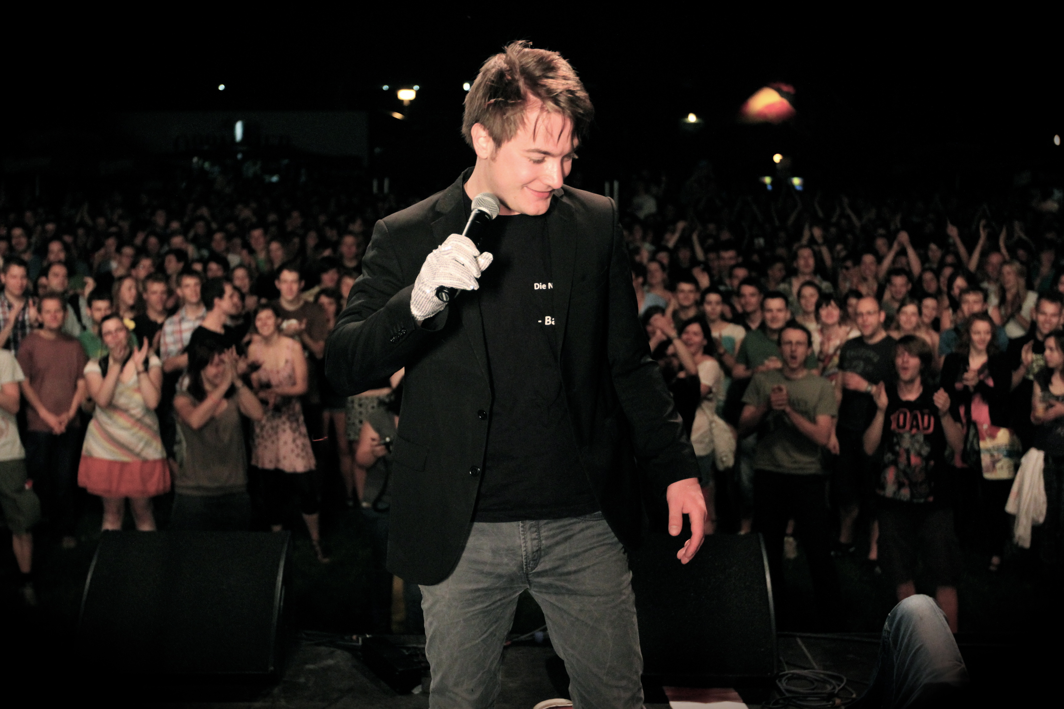 Tim Gernitz - live 2015